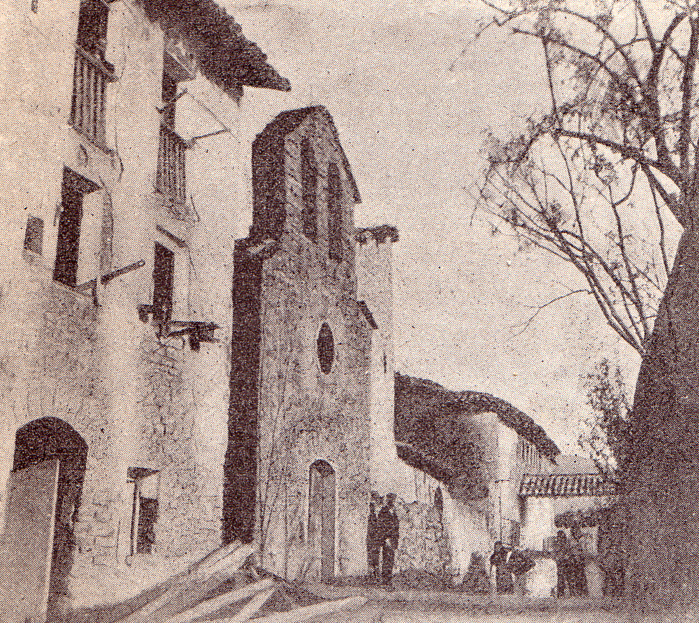 Imatge del Pont de Claverol de vers el 1912 (Conca de Dalt, Pallars Jussà)